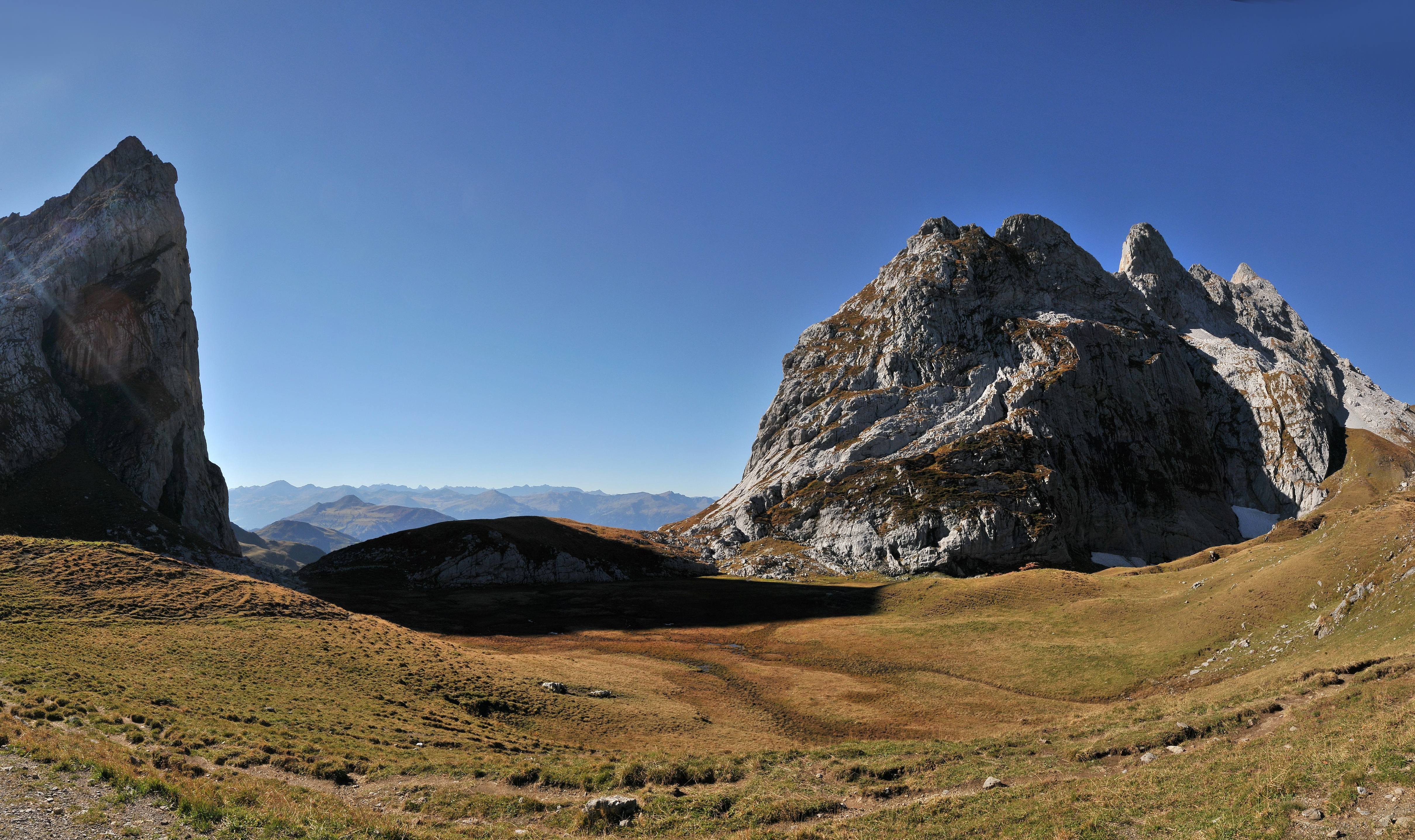 Blick durch das Schweizertor. Links erhebt sich senkrecht die Torkante zur Drusenfluh 2.827 m. Rechts sind die Ausläufer der Kirchlispitzen. Hier verläuft die Staatsgrenze Österreichs zur Schweiz. NOTE: This image is a panorama consisting of multiple frames that were merged or stitched in software. As a result, this image necessarily underwent some form of digital manipulation. These manipulations may include blending, blurring, cloning, and colour and perspective adjustments. As a result of these adjustments, the image content may be slightly different from reality at the points where multiple images were combined. This manipulation is often required due to lens, perspective, and parallax distortions.